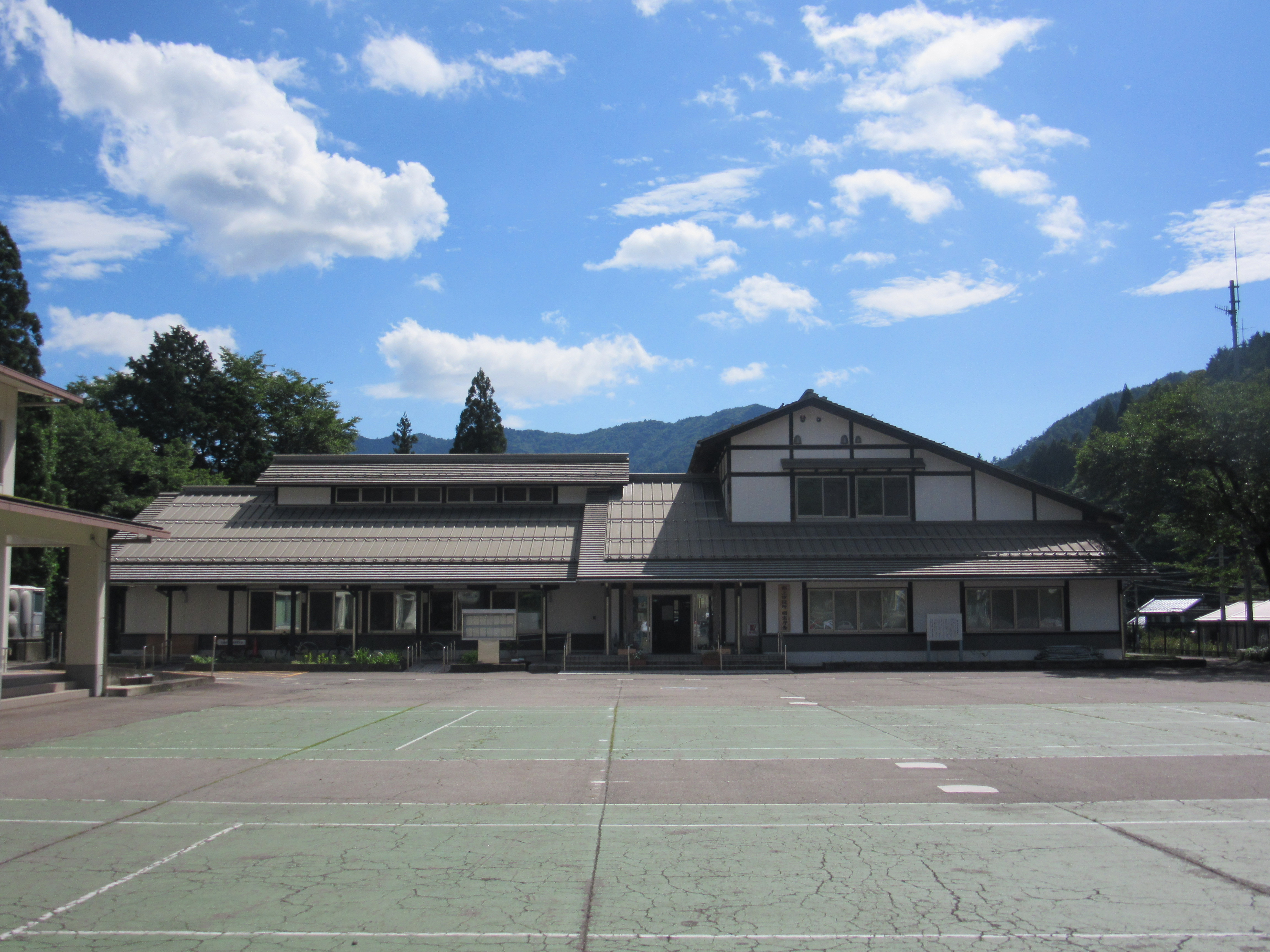 郡上市役所明宝支所